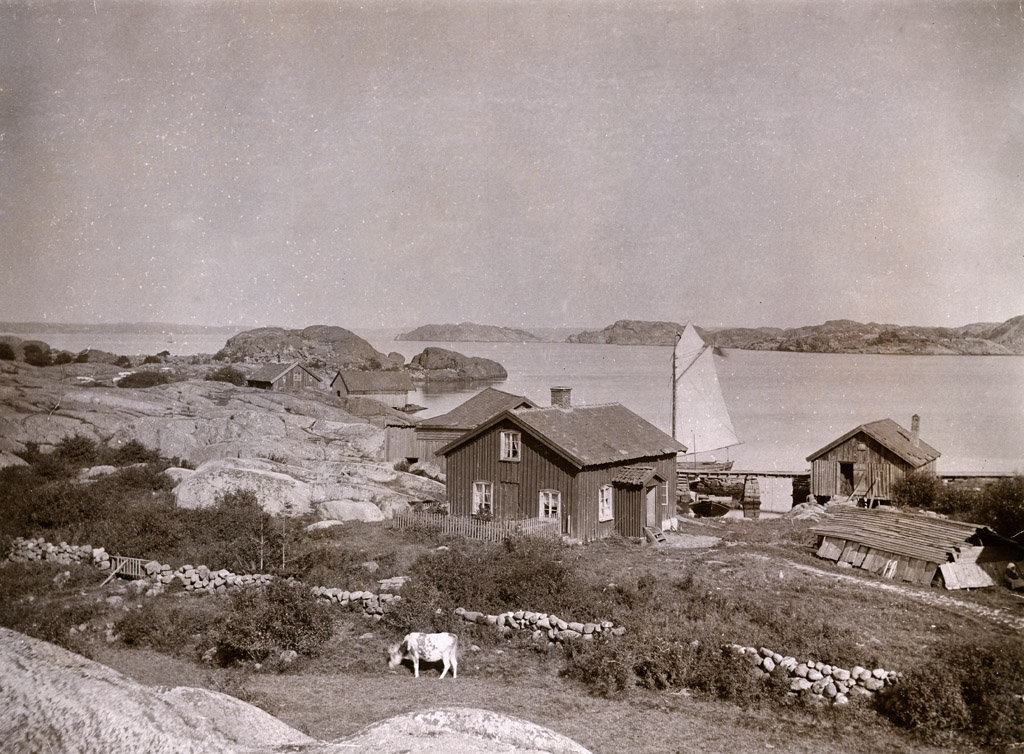 Gåsö. Skaftö socken. Bohuslän. Liten kustgård med stengärdsgård och betande ko. Gården ligger vid Lunnevik på Gåsö på västkusten. Ön till vänster vid horisonten är Blåbergsholmen.